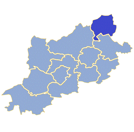 Powiat zielonogórski - Gmina Babimost